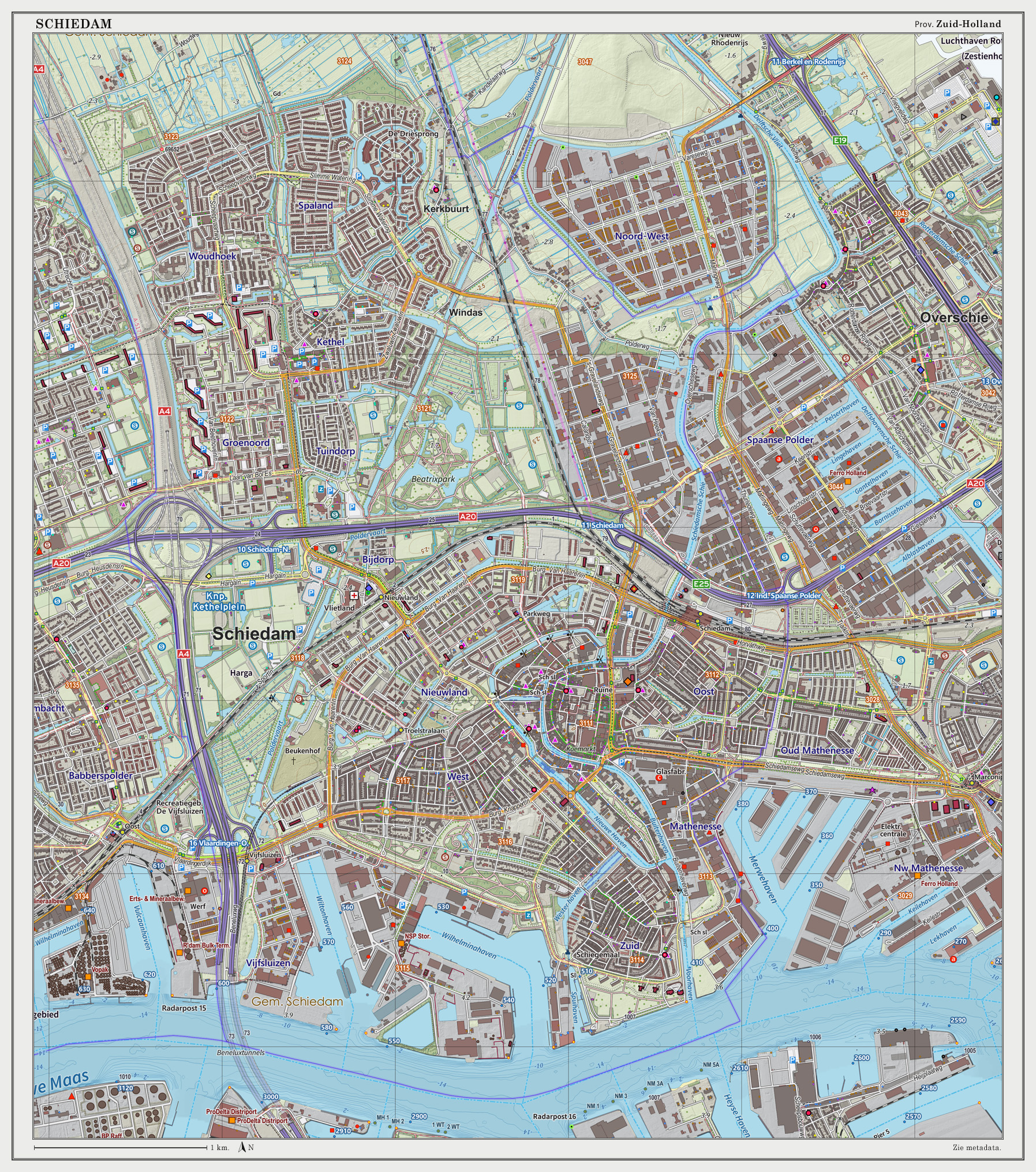 Topografische kaart van Schiedam (woonplaats). Resolutie: 300 pixels/km. Kaartbeeld samengesteld uit de open geodata van de Top10NL en Top25namen (Basisregistratie Topografie, Kadaster), Creative Commons BY licentie. Gebouwvlakken uit open geodata BAG extract. Wegen uit de OpenStreetMap. Reliëfschaduw uit de Actuele Hoogtekaart AHN2. Samenstelling en kleurenschema: Jan-Willem van Aalst, met QGIS2. Zie ook de Legenda.